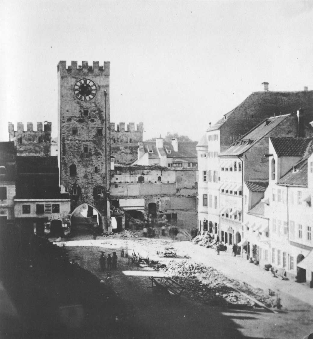 Das Karlstor mit seinem durch eine Pulverexplosion zerstörten Nachbarhaus